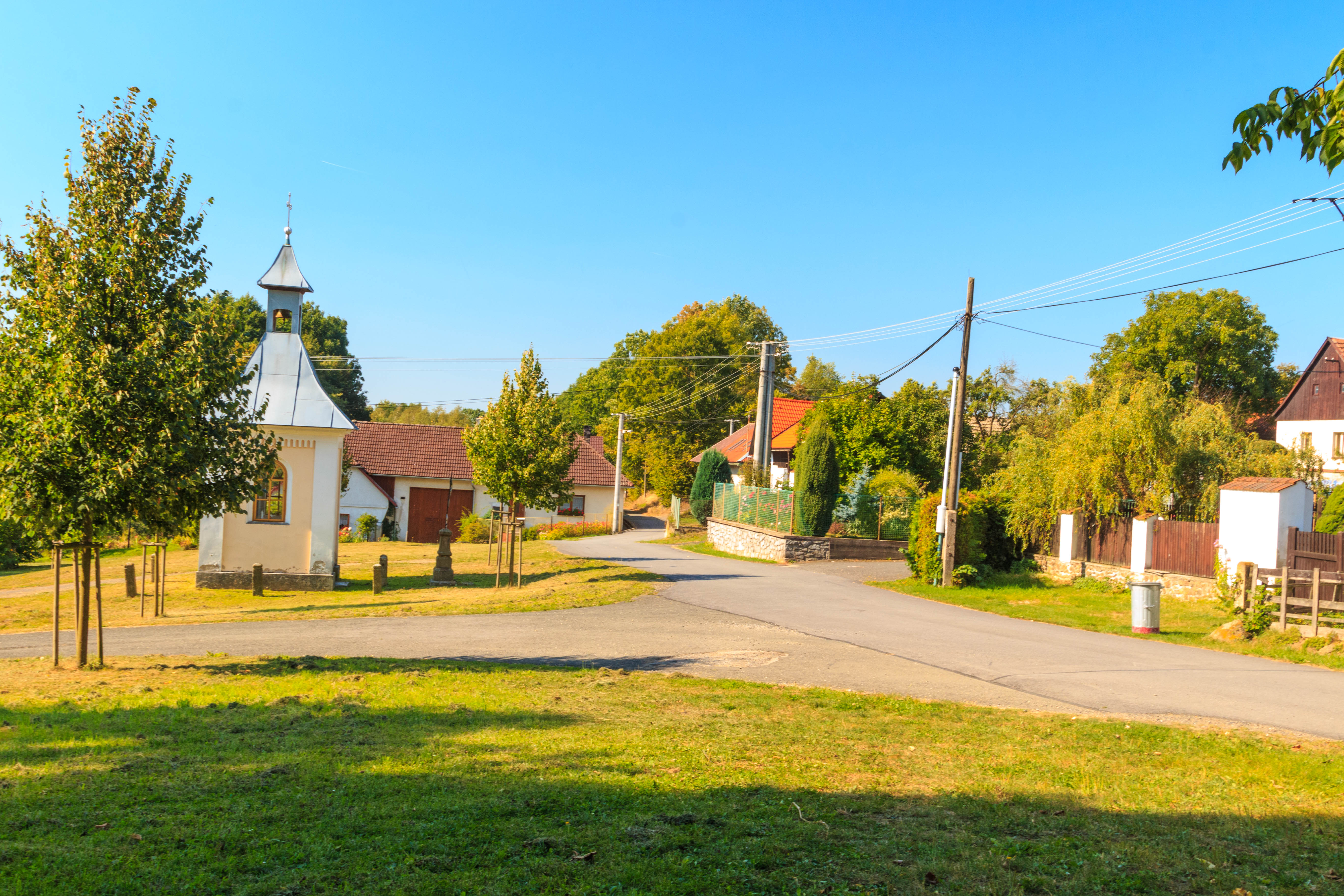 Speřice - náves